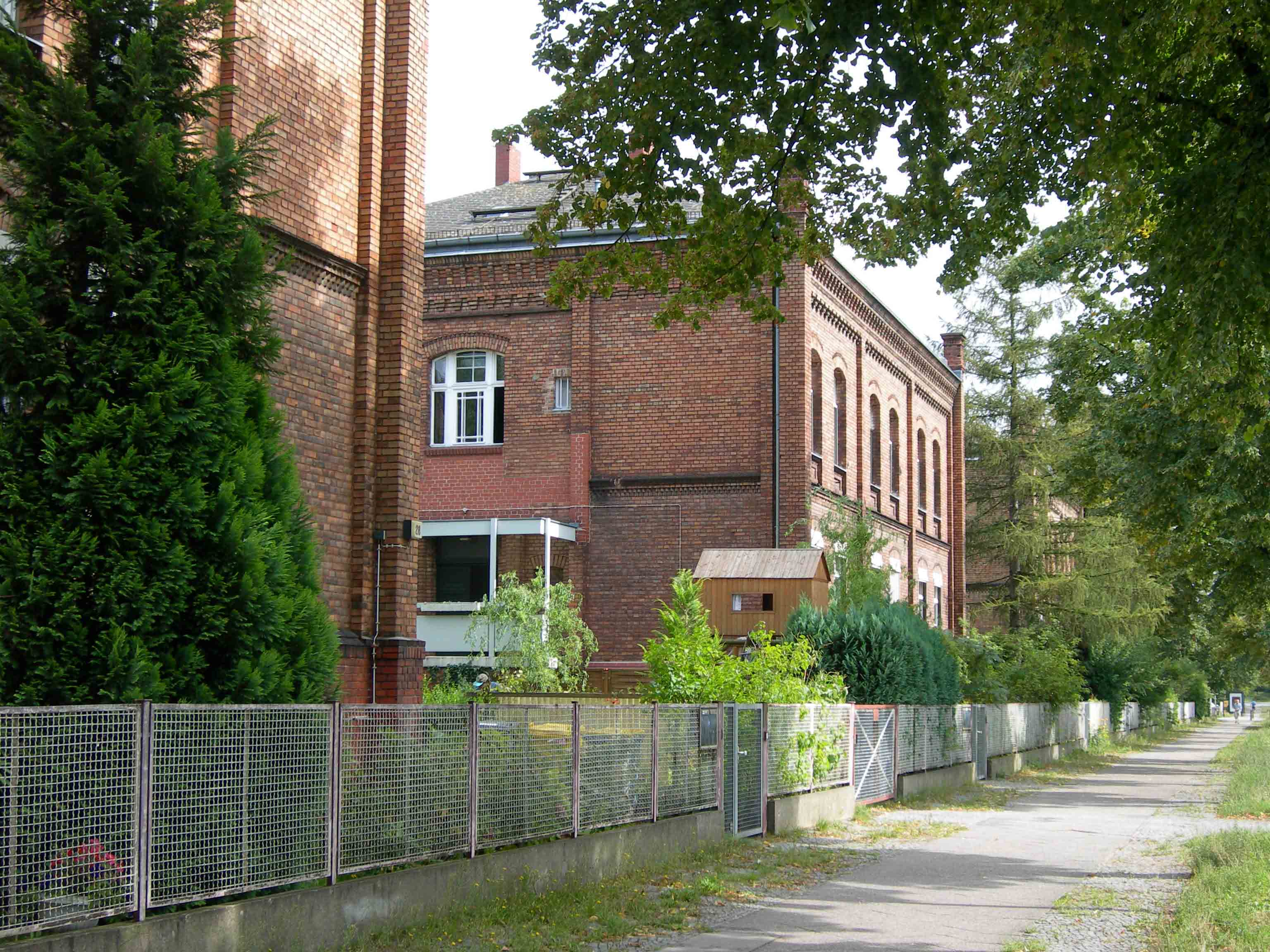 Ploetzensee prison - jailers housing